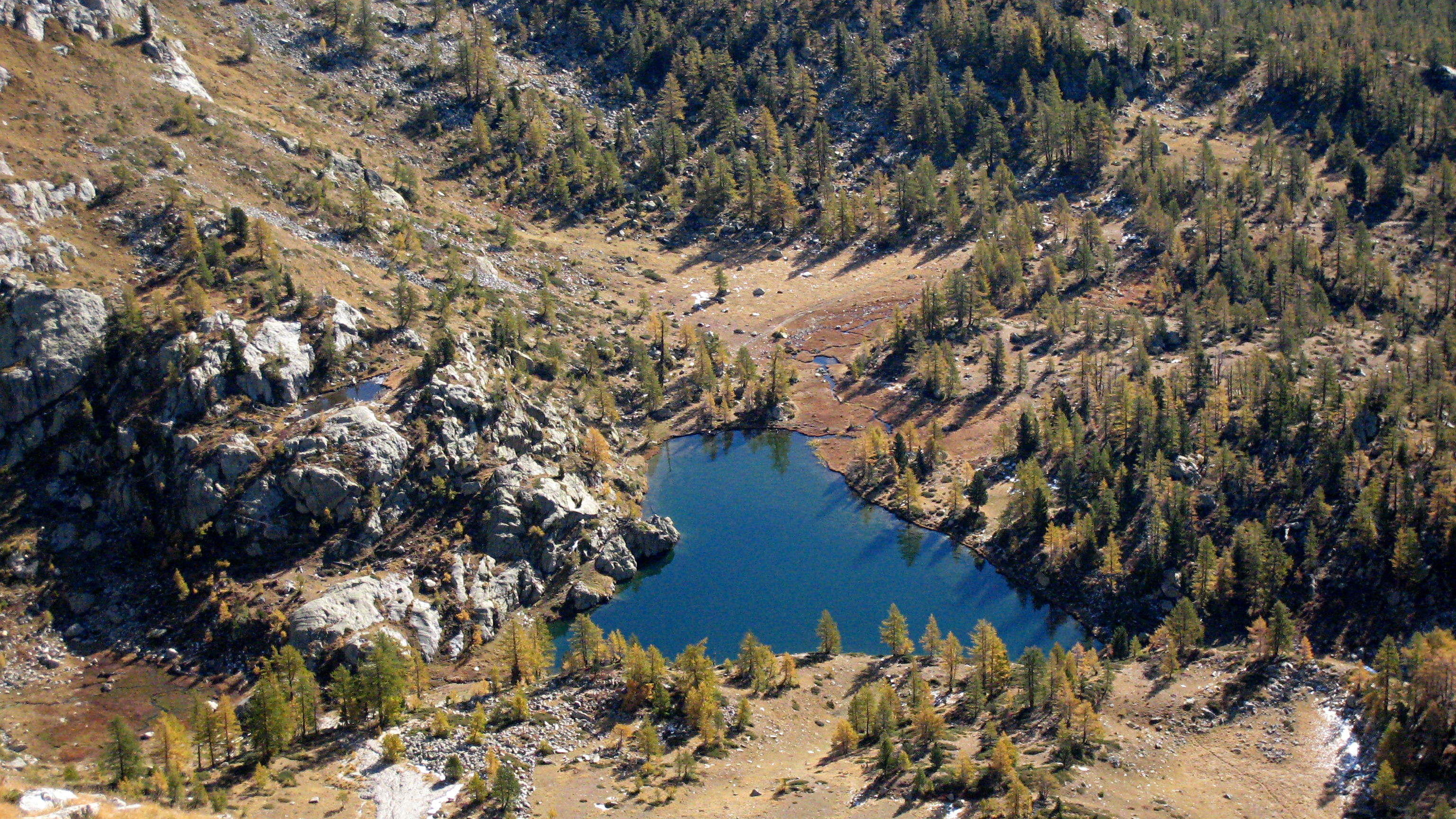 Lac de Graveirette, parc national du Mercantour